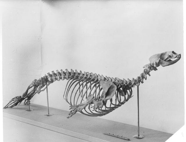 KM 10087:1-2 harppuuna ja hylkeen luuranko; Esinekuva; KM 10087:1-2 harppuuna ja hylkeen luuranko, Esinekuva, Närpiön hylje rekonstruoituna